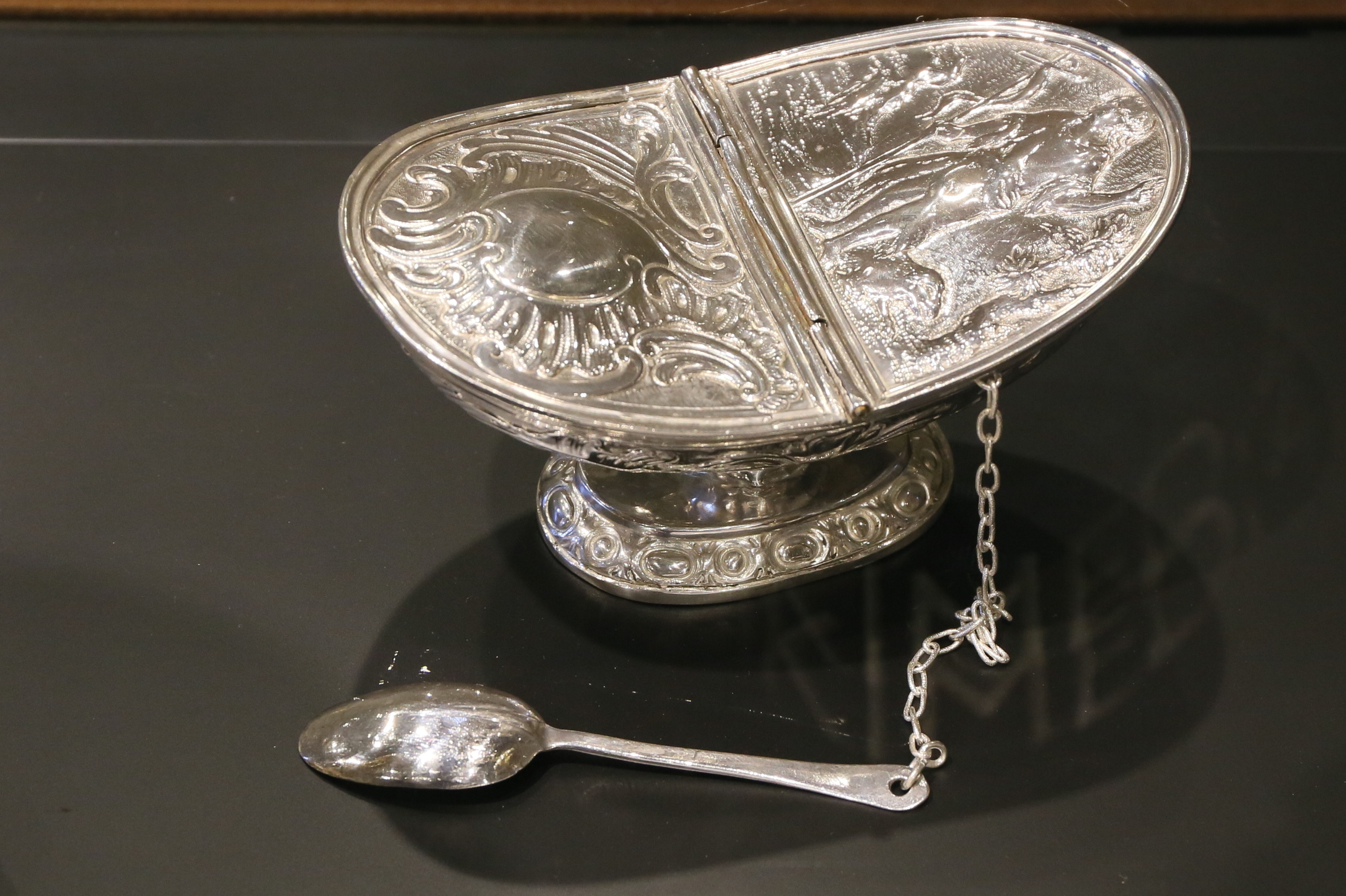 Navette à encens en argent partiellement vermeillé, parti du trésor de Saint-Jean-du-Doigt.